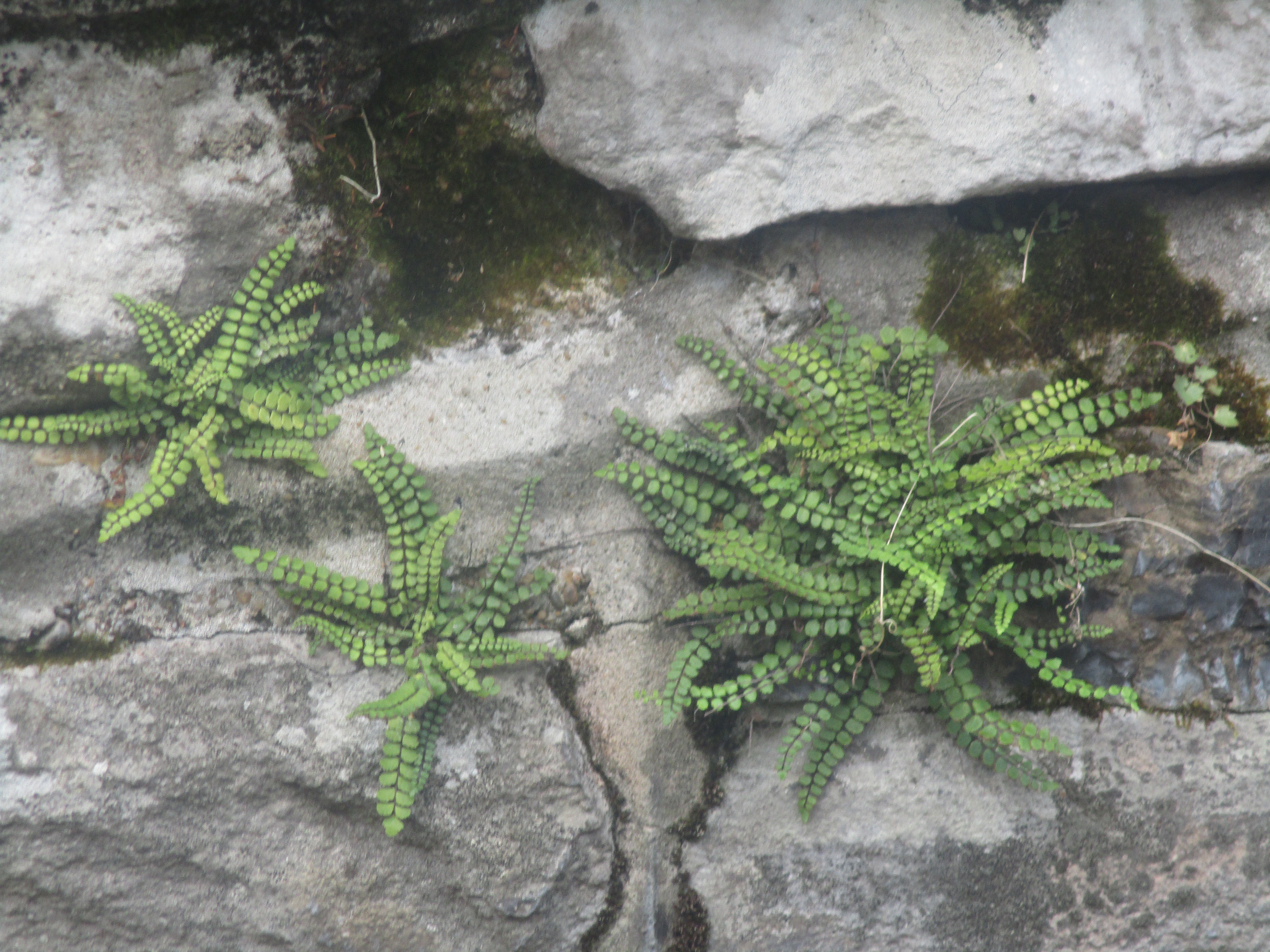 Fougères sur un mur de Bayonne, août 2018.Asplenium trichomanes, capillaire des murailles.